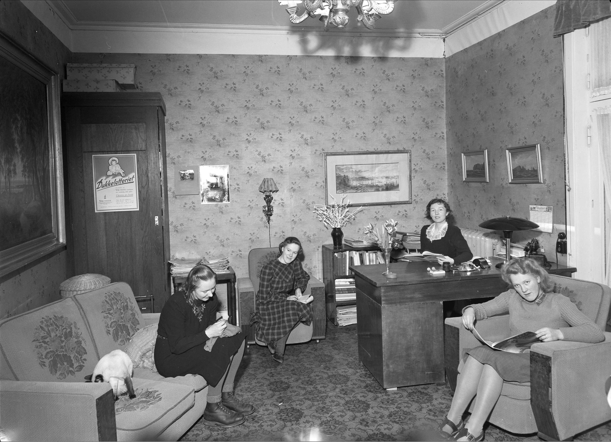 Interiørbilde fra Professor Dahls gate 26, som like etter krigen huset Unge pikers fritidshjem. Foto: Leif Ørnelund (27. februar 1947). Fra Byhistorisk samling hos Oslo Museum.